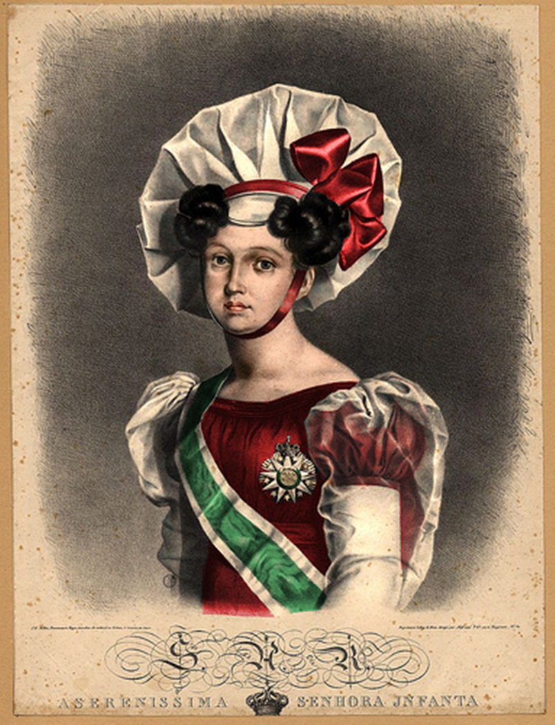 Infanta Isabel Maria de Portugal